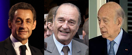 Les anciens présidents de la République française, Nicolas Sarkozy, Jacques Chirac et Valérie Giscard d'Estaing, membres de droit du Conseil constitutionnel